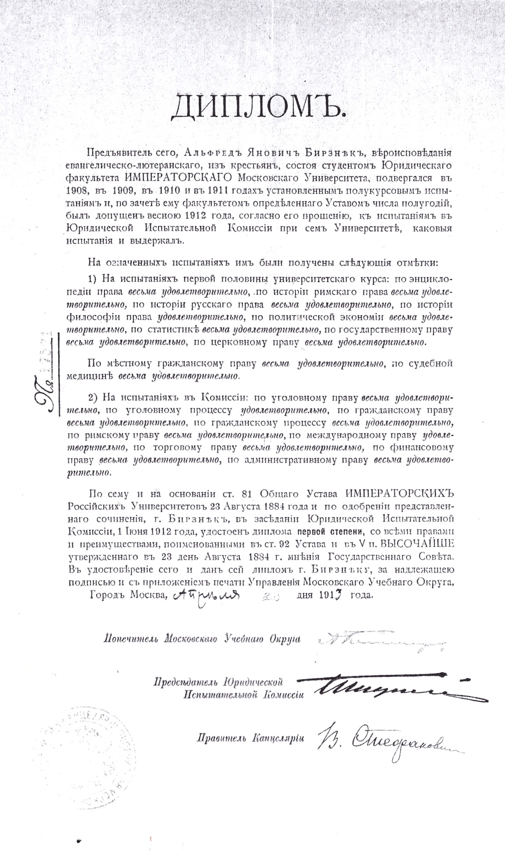 A. Birznieka diploms